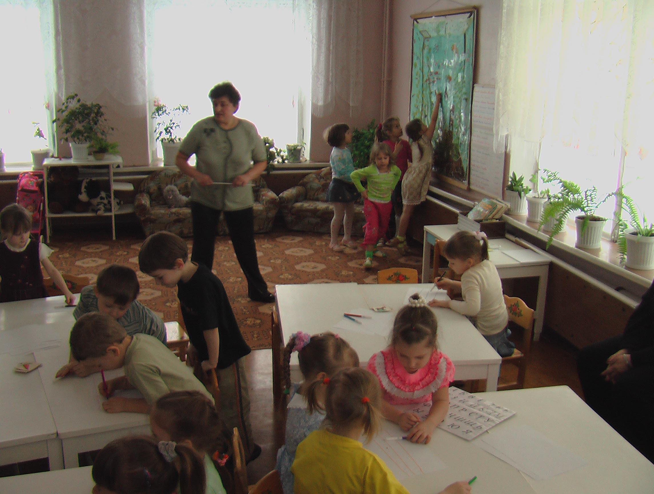 Фотография характерного занятия в детском саду в социо-игровом стиле: - общая подвижность и динамичная смена мизансцен; - работа в малых группах; - дети увлечены ходом учебной работы, обсуждают её и сами оценивают свои успехи между собой; педагог не руководит и не оценивает, а «запускает» учебную работу, наблюдает за её ходом и за тем, как проявляют себя дети.